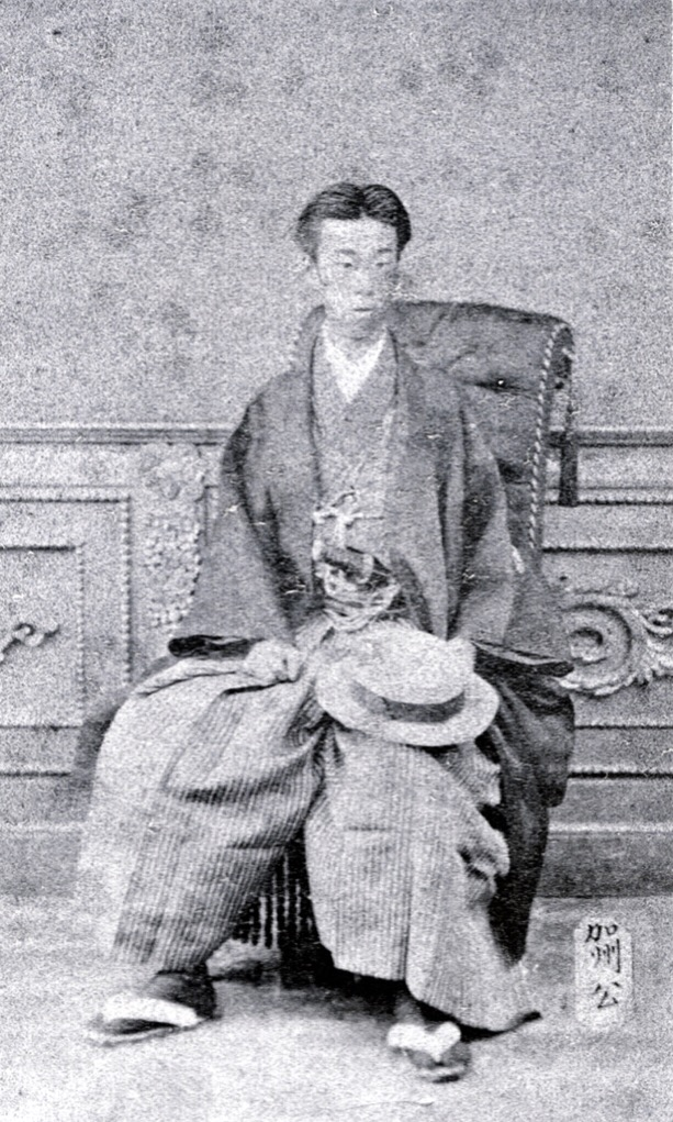 前田利嗣の肖像写真